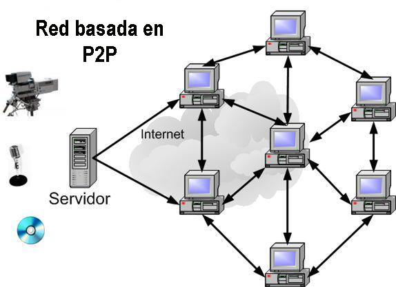 Imagen generada con Microsoft Visio y alguna imagen libre insertada de (micrófono, cd y cámara)